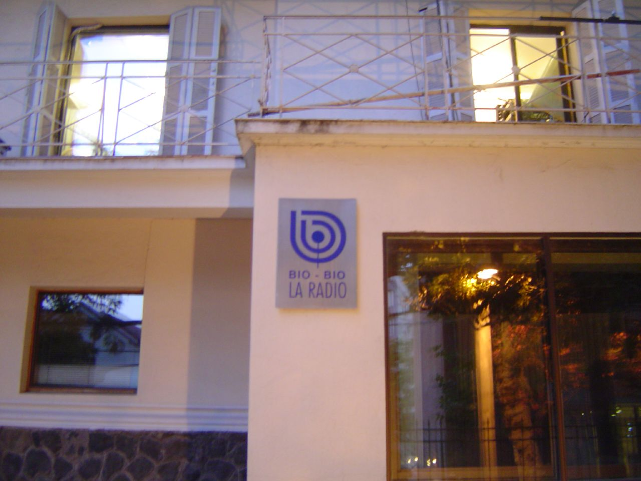 No la conocía.